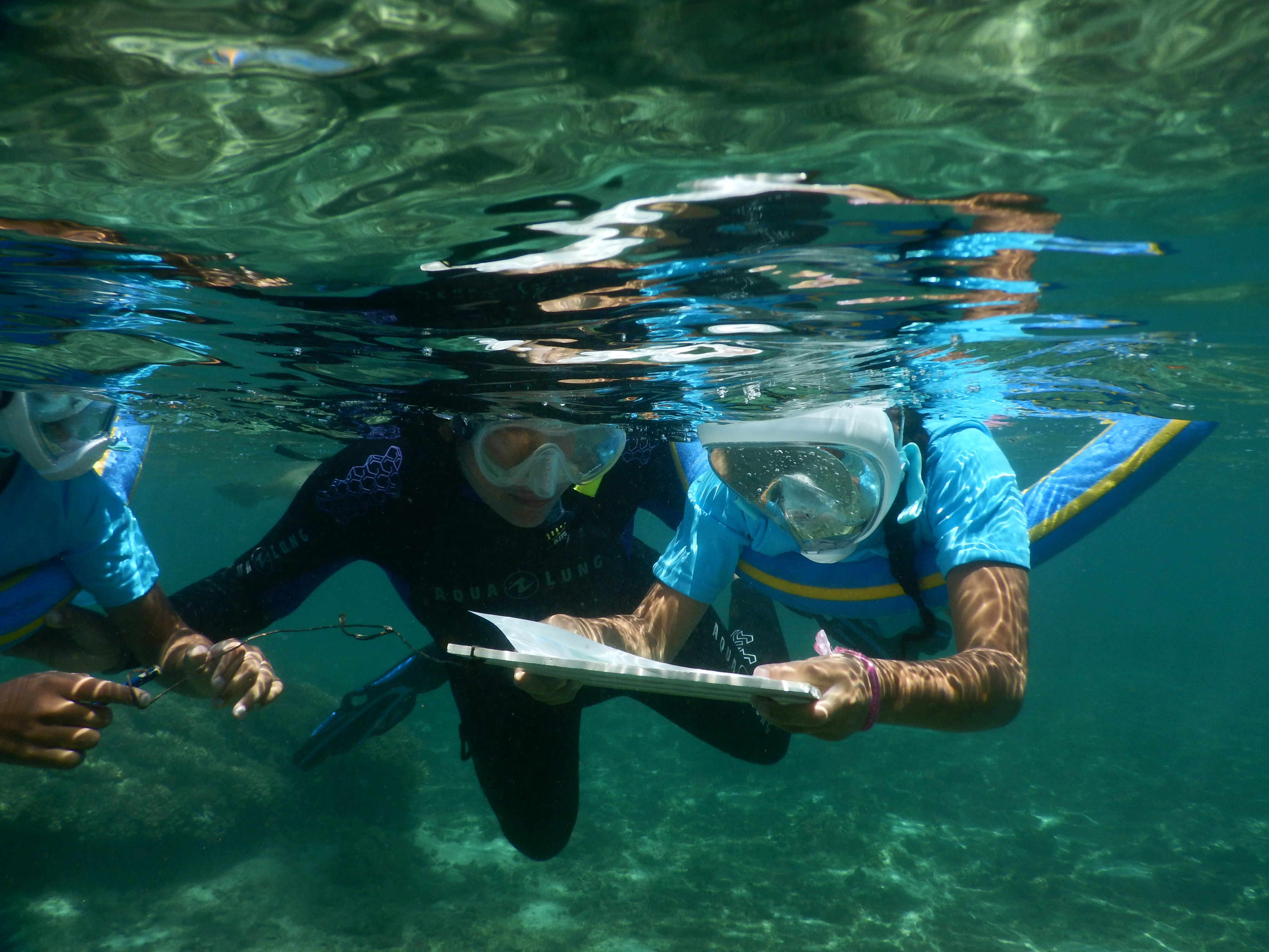 Sortie sous-marine de suivi du récif coralien. Aire marine éducative de Saint-Leu. La Réunion.